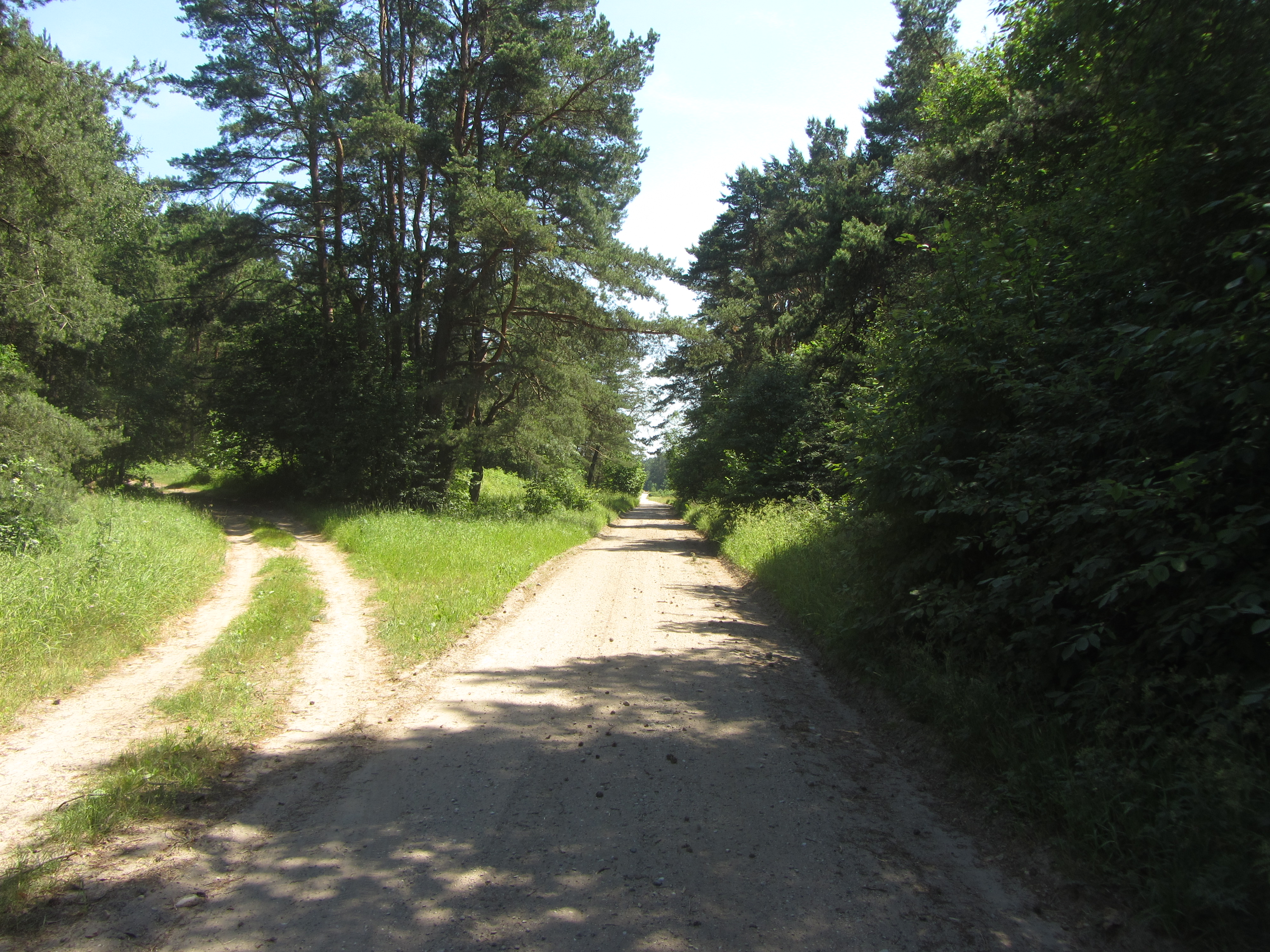 Daugų sen., Lithuania